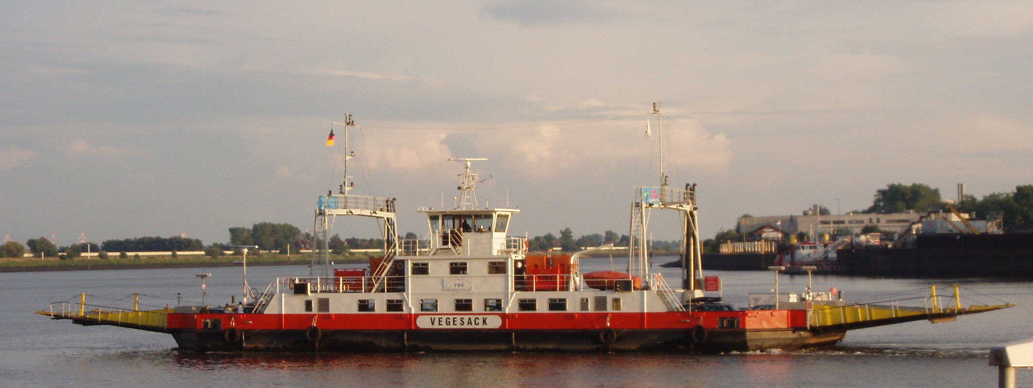 Fähre "Vegesack", von der Weserpromenade aus gesehen